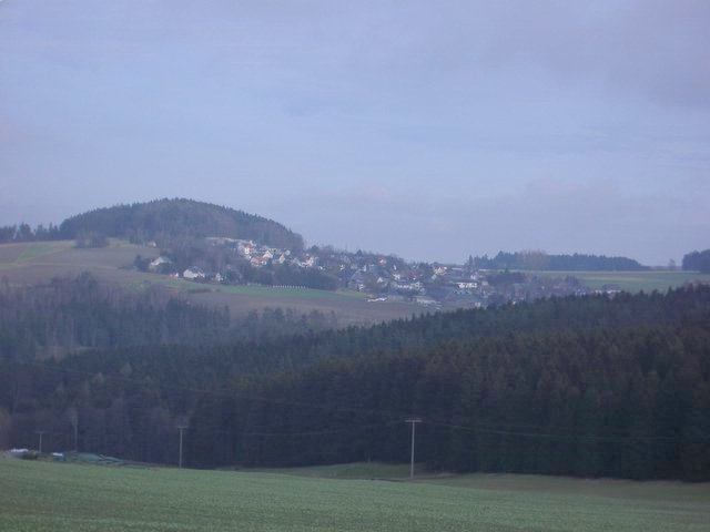 Eisenbühl, Ortsteil der Berg (Oberfranken) mit dem Hausberg Gupfen selbst aufgenommen im Januar 2007